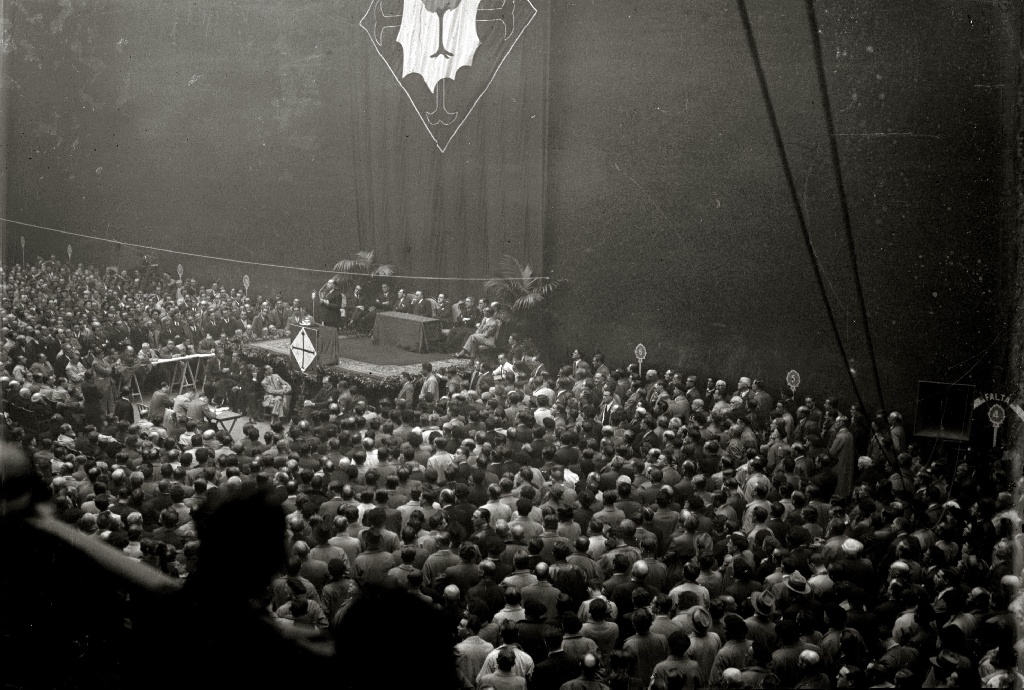 Título original: Mitin de José María Gil Robles, lider de la CEDA (Confederación Española de Derechas Autónomas), en las instalaciones de un frontón (4/7) Localización: San Sebastián (Guipúzcoa)